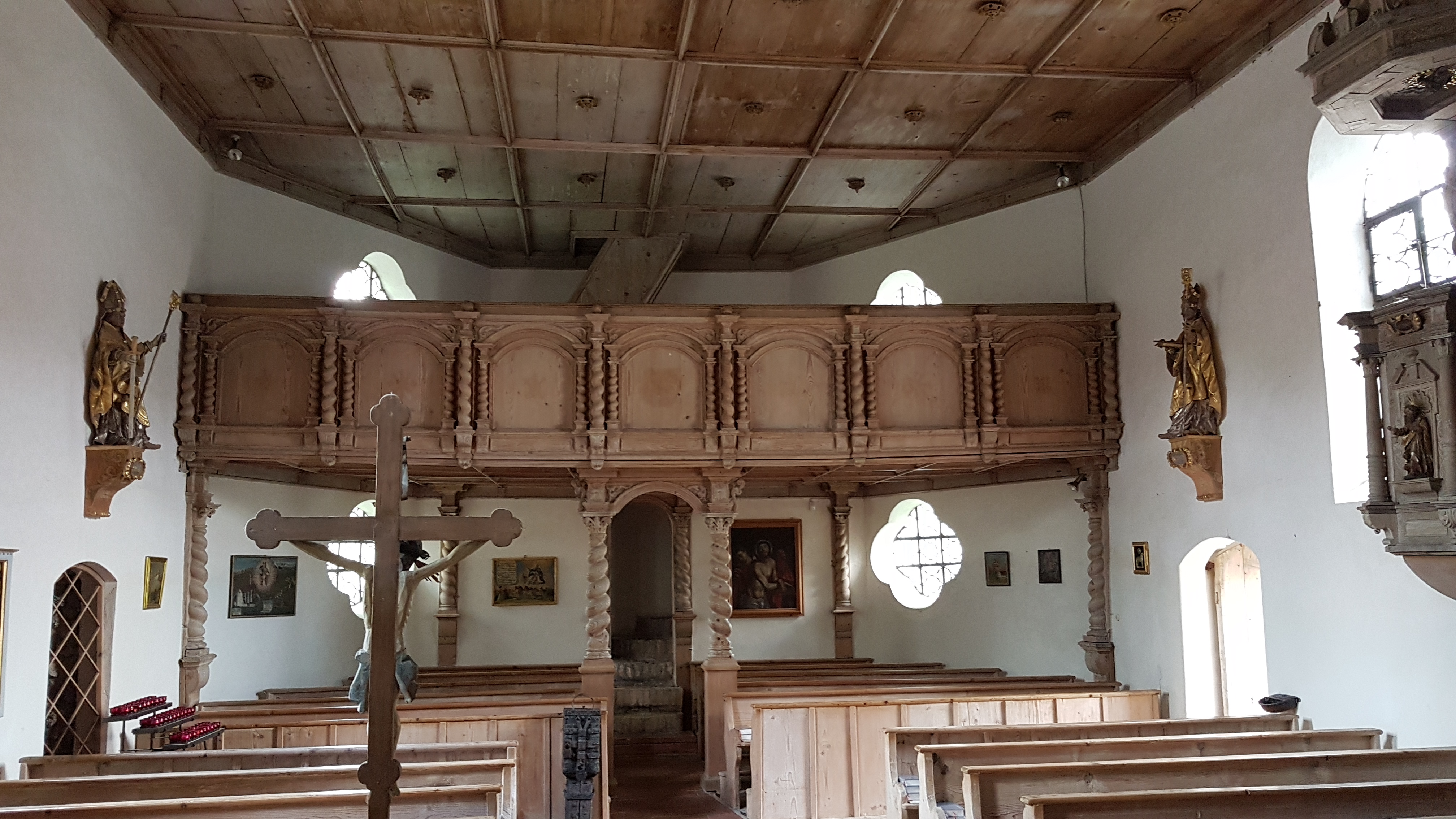 Thaining, Kirche St. Wolfgang, Blick vom Kreuzaltar zur spätbarocken Westempore von 1709.